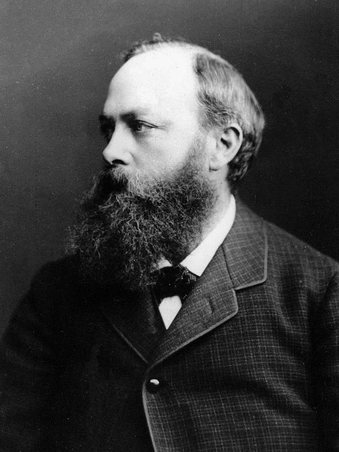 Carl Graebe